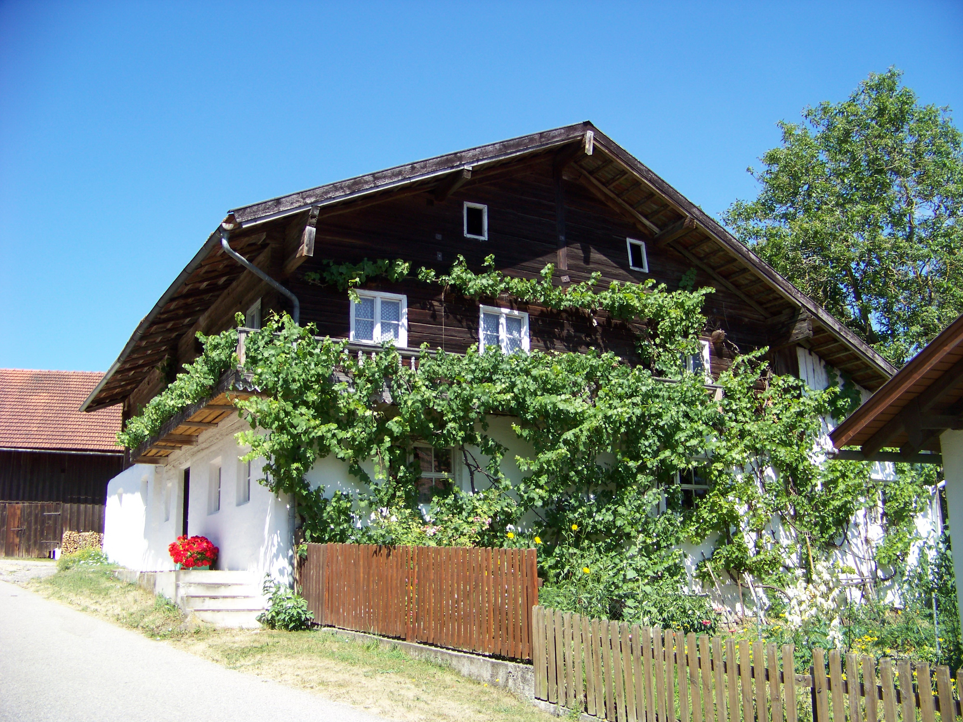 Moosthenning, Schmiedberg 8, Wohnstallhaus. Flachsatteldachbau mit Blockbau-Obergeschoss und zweiseitig umlaufendem Schrot, 2. Hälfte 18. Jahrhundert.